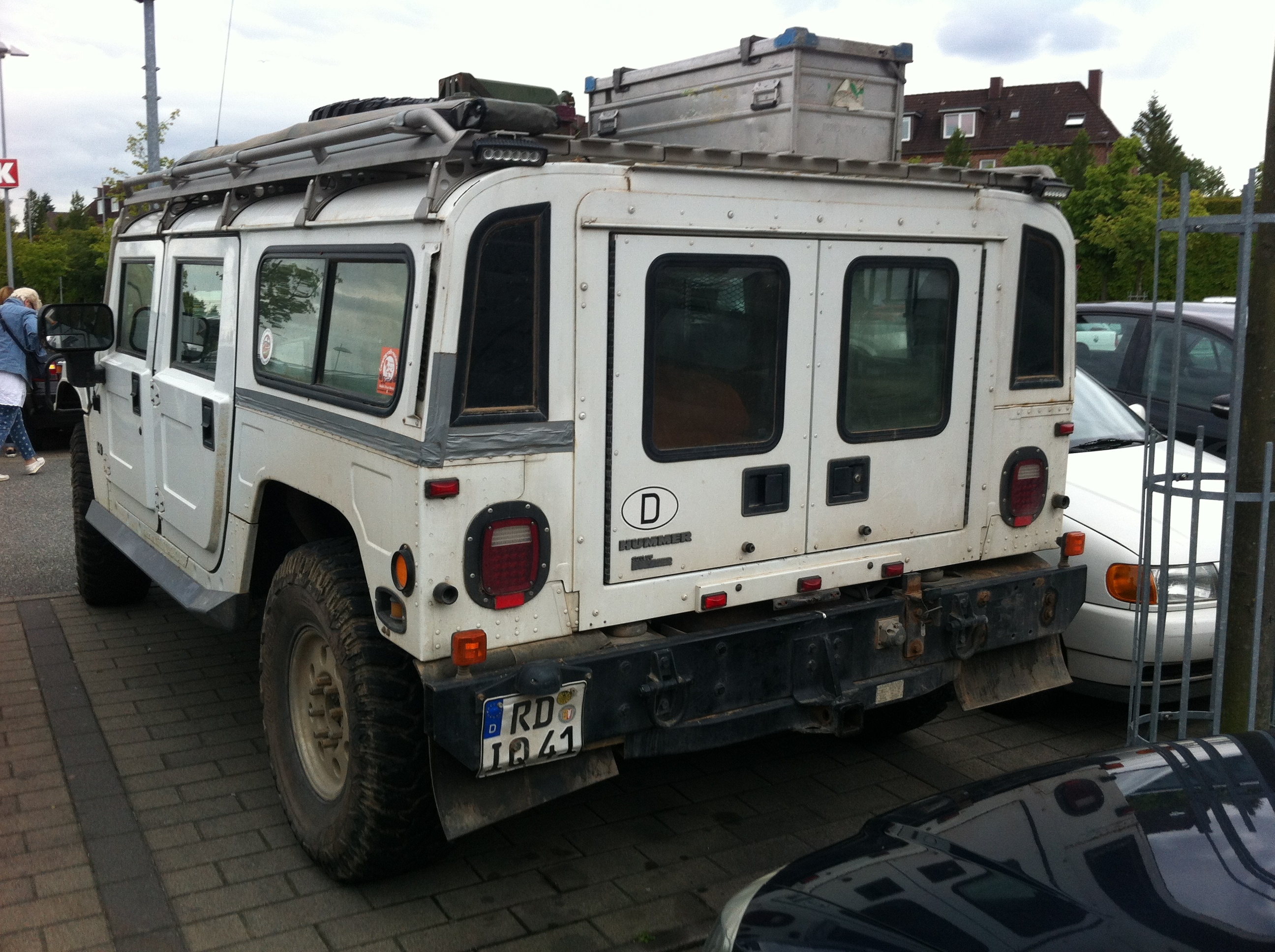 ziviler Hummer H1, Heckansicht